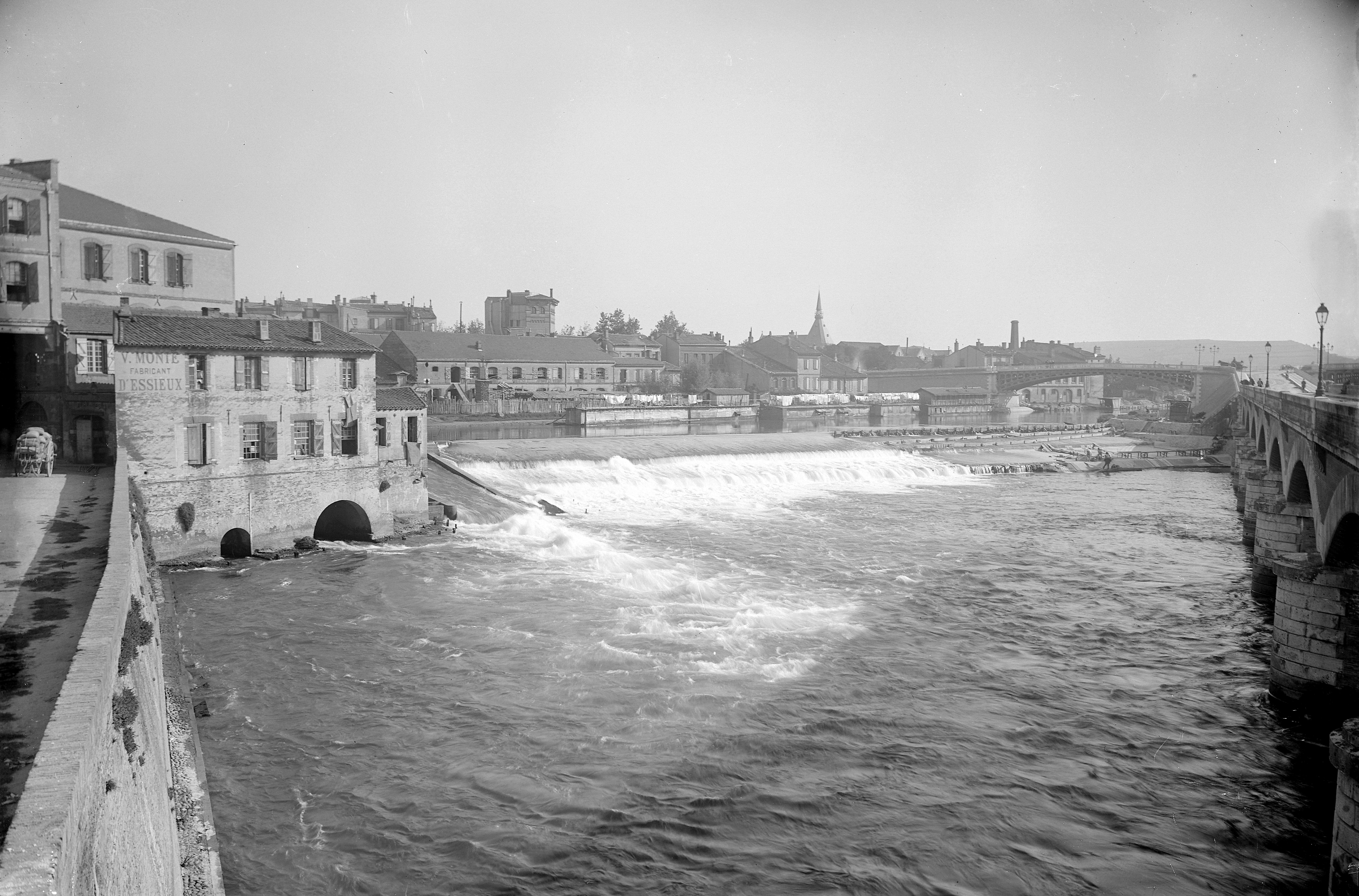 plaque négative au gélatino-bromure d'argent, format 18x24 cm. Sans mention d'auteur. Une étiquette gommée collée sur la plaque portait l'inscription manuscrite : "Chaussée du Bazacle Toulouse"